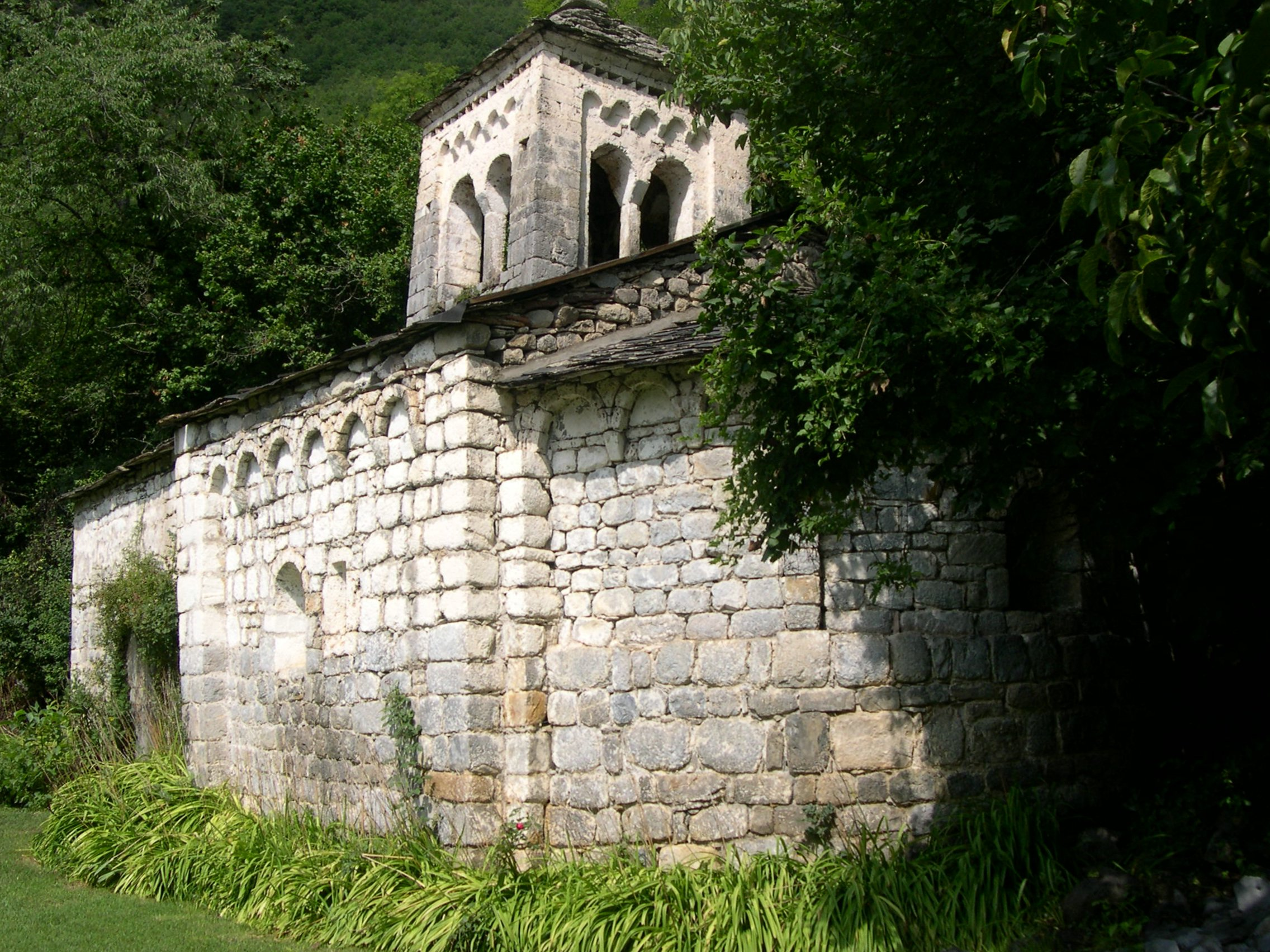 Ermita de El Run